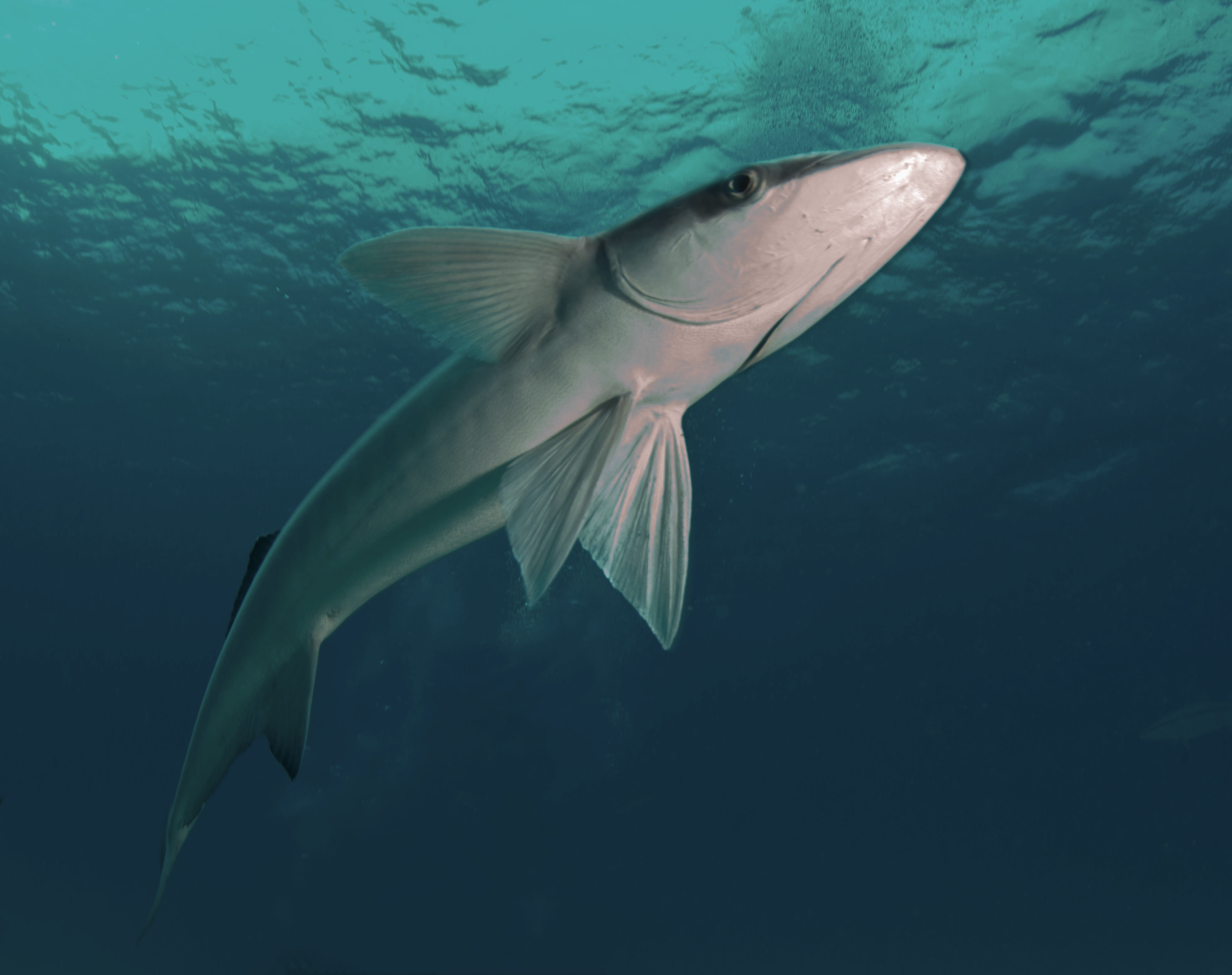 Remora